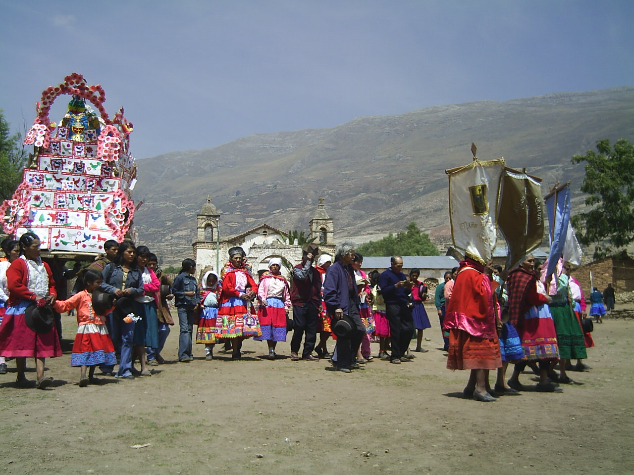 Procesión de la Virgen Maria en Carampa -Ayacucho Procesión de la Virgen Maria el dia 24 de Agosto.